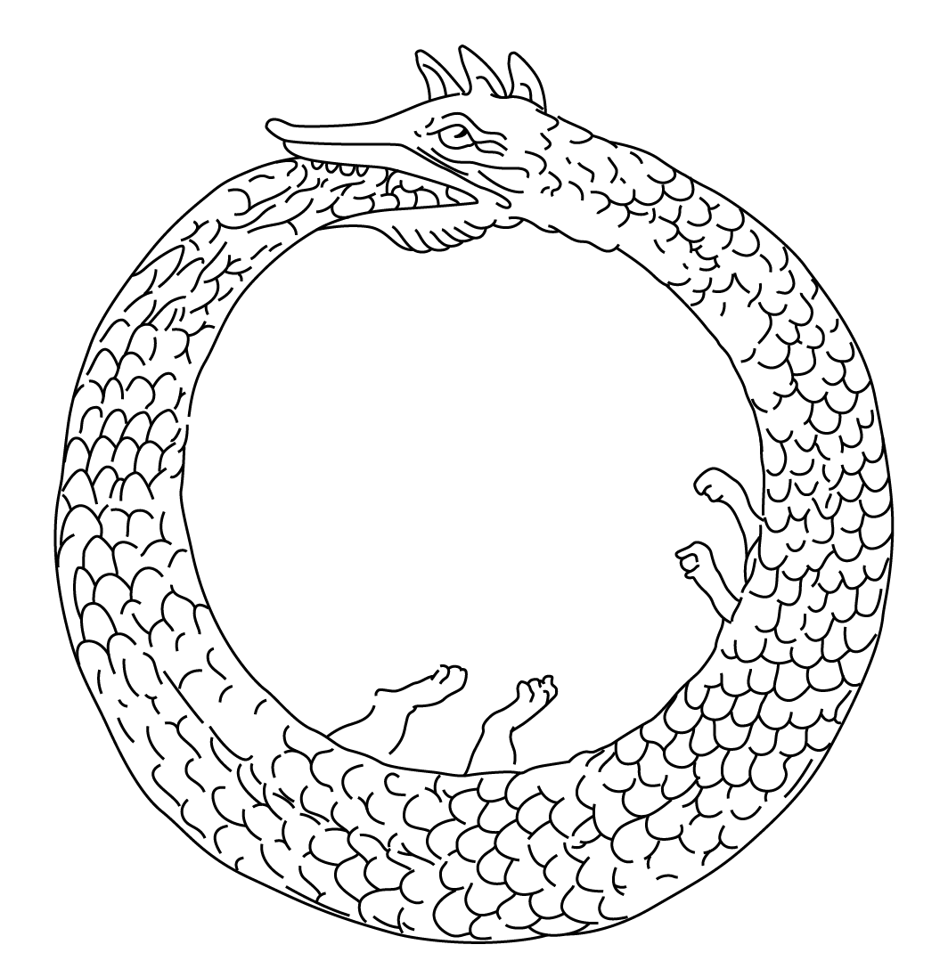 Ouroboros